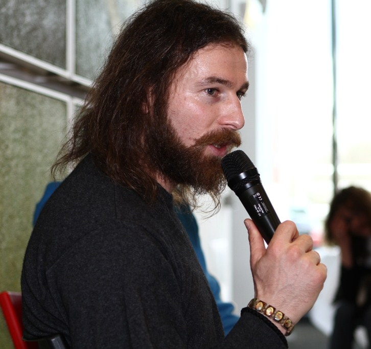 Ioannis Amanatidis bei der Kinderpressekonferenz im Eintracht Frankfurt Museum 2010